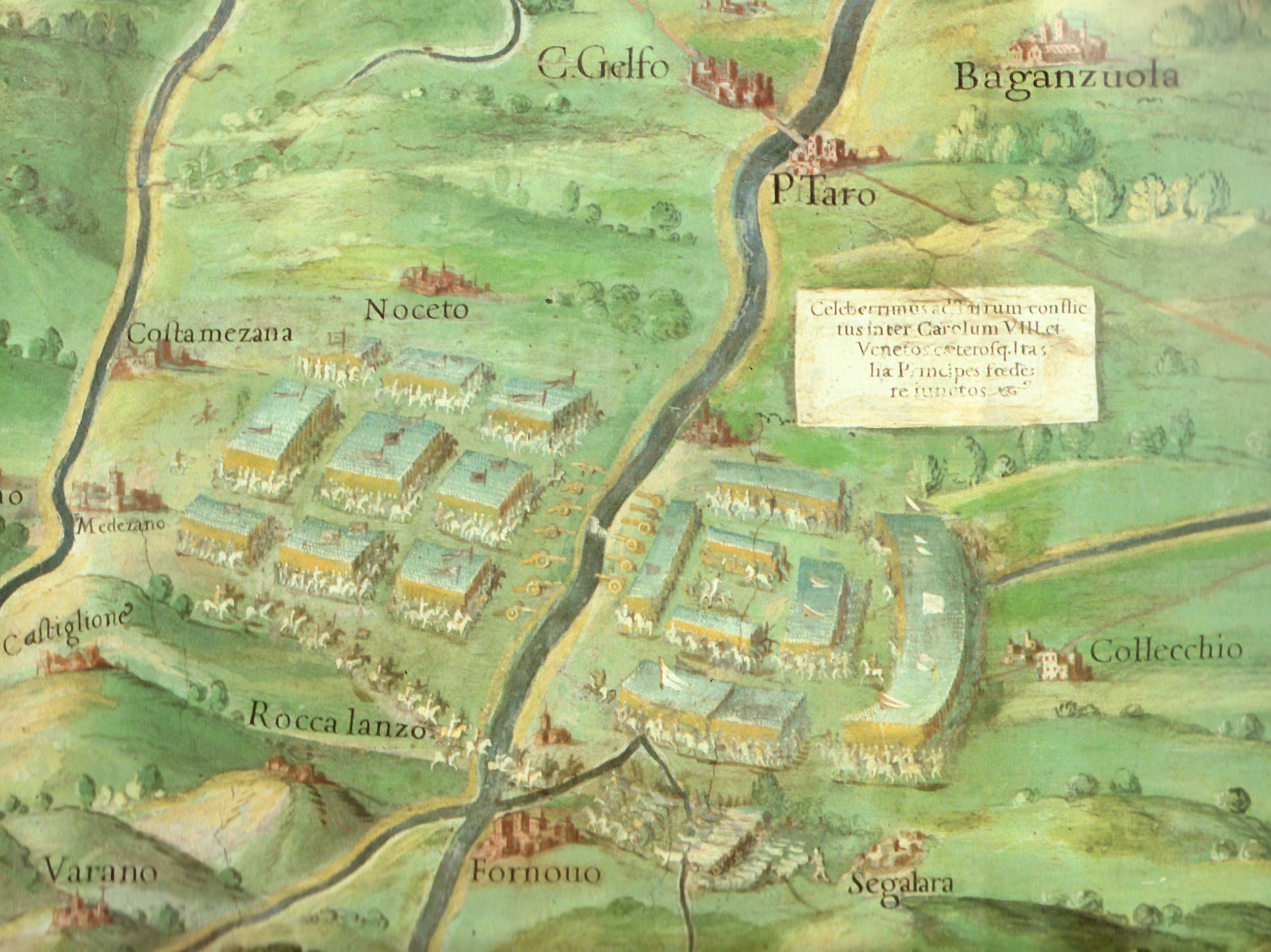 Fornovo's Battle (1495) - fresco from "Galleria delle Carte Geografiche", Musei Vaticani.